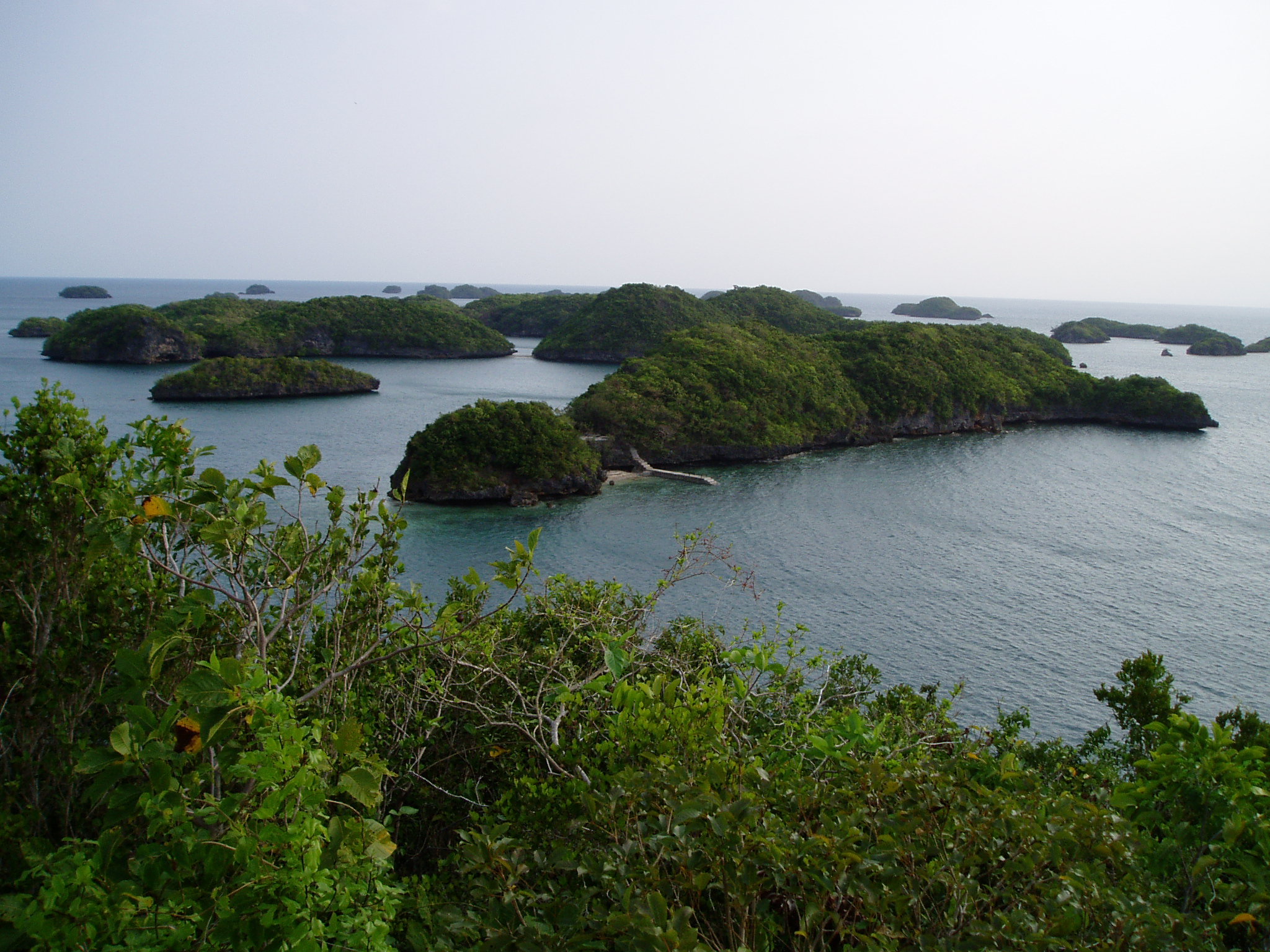 Tagalog: Ang byu ng mga pulo sa Hundred Islands National Park mula sa pulo ng Gobernador (aking ginawa)